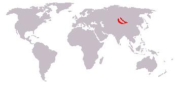 Bewerking afbeelding: Afbeelding_(kaart).JPG